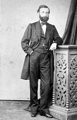 Charles Champoiseau